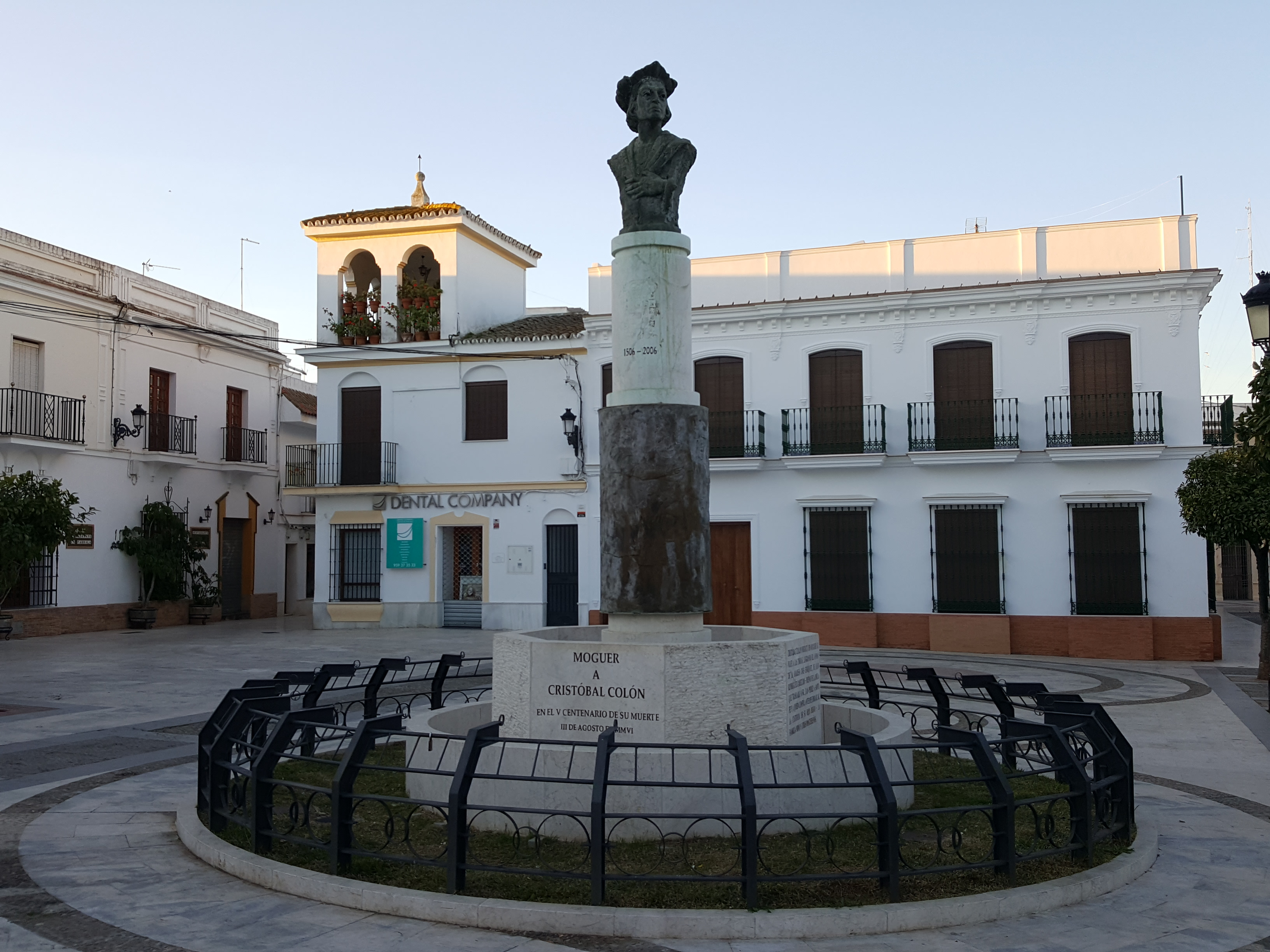 Monumento a Cristóbal Colón en Moguer Andalucía (España).